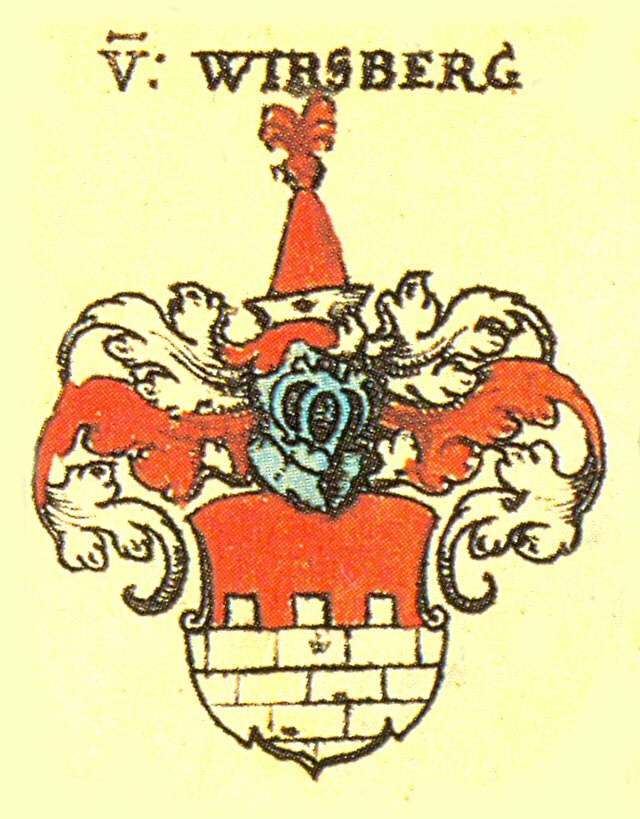 Wappen der Fränkischen Adelsfamilie Wirsberg